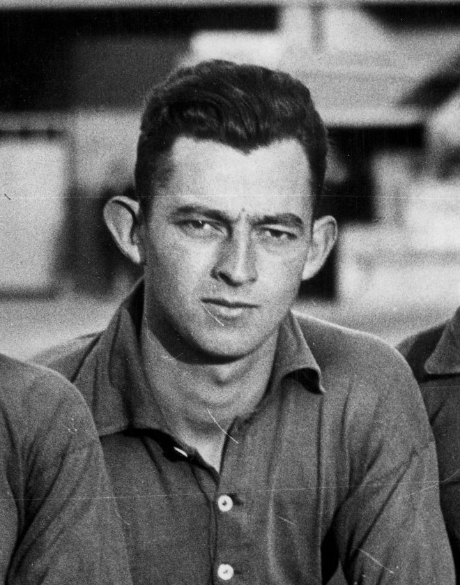 Bep Bakhuys, portret uit 1935.